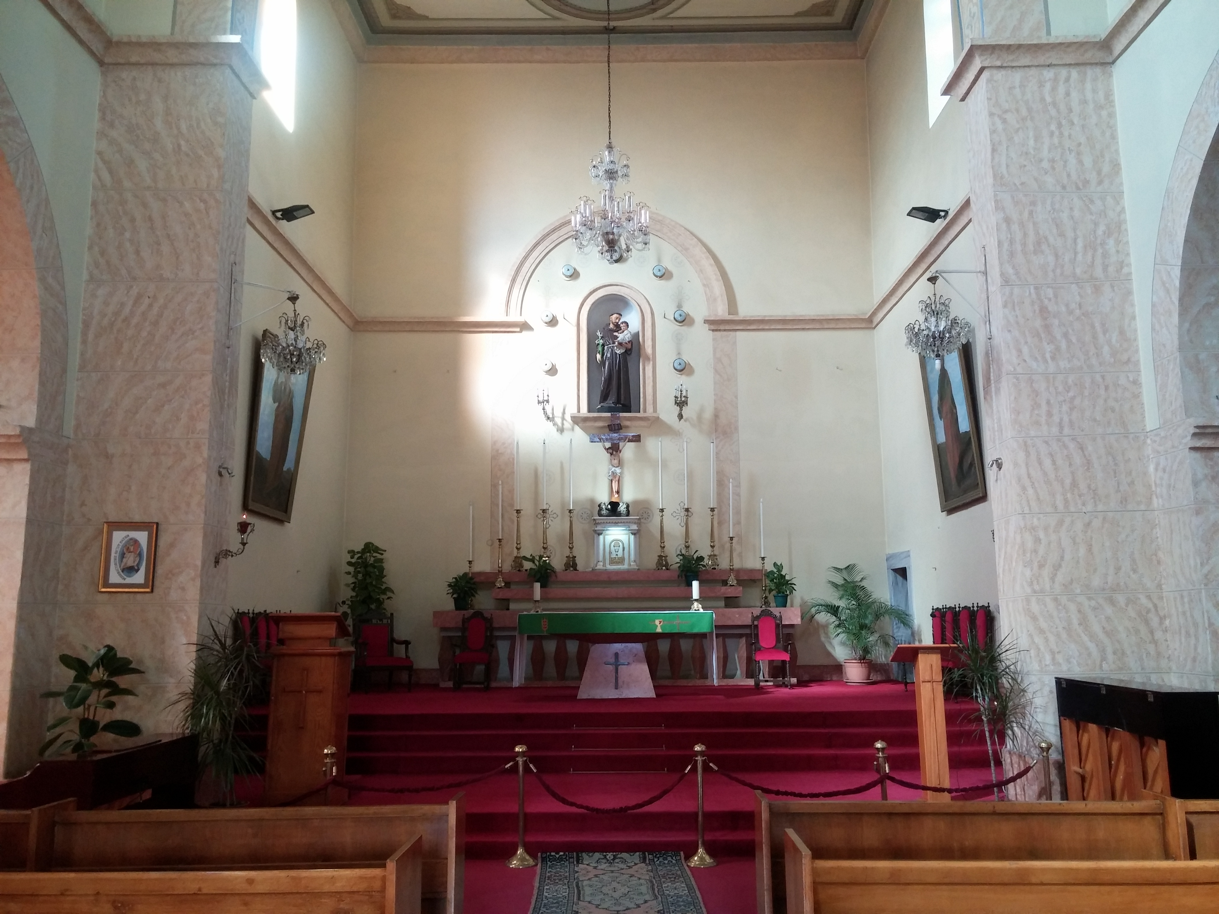 Akdeniz ilçesindeki Katolik kilisesinin iç görünümü.